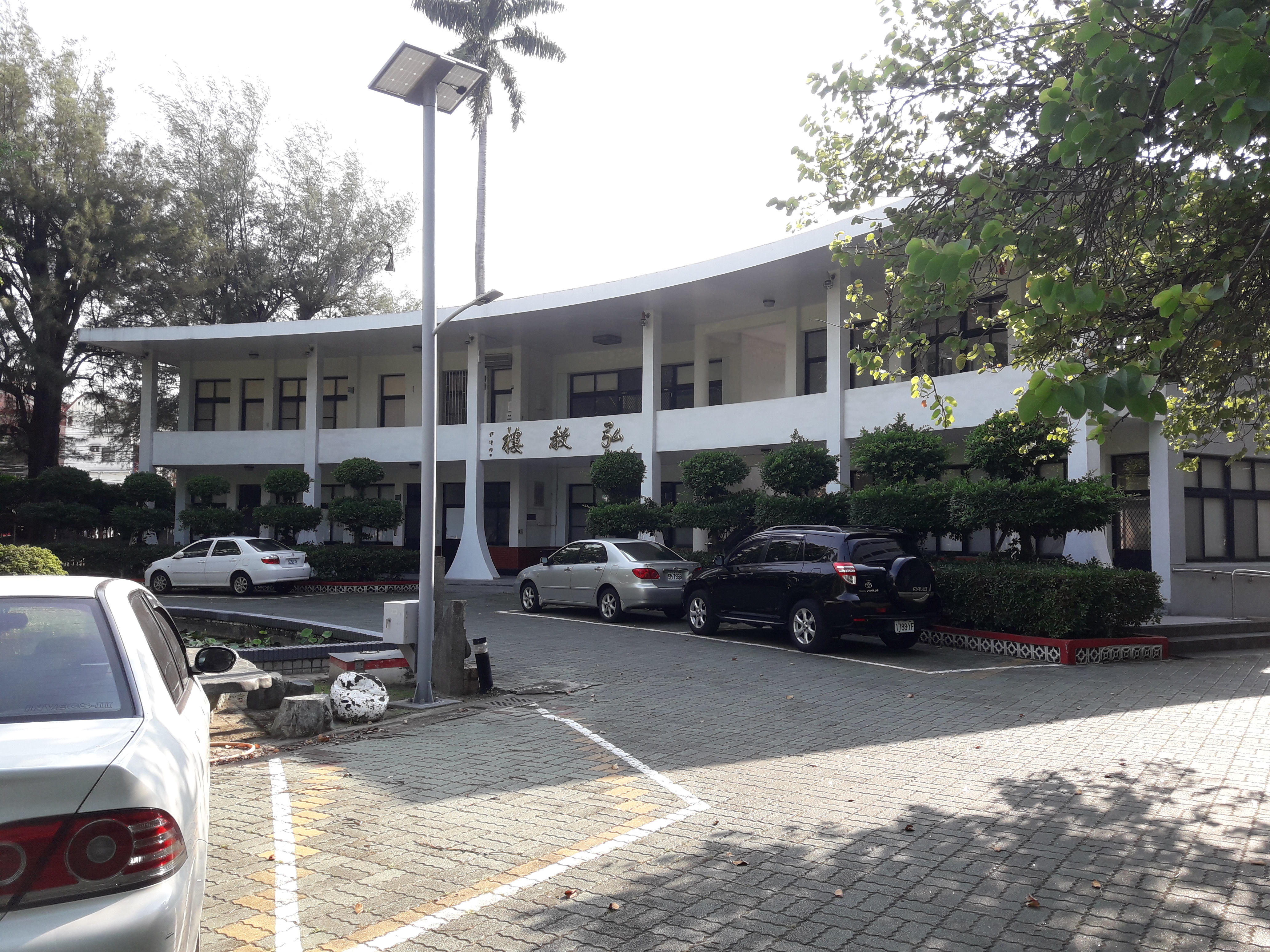 國立虎尾高級中學弘教樓，為臺灣著名建築師修澤蘭設計。